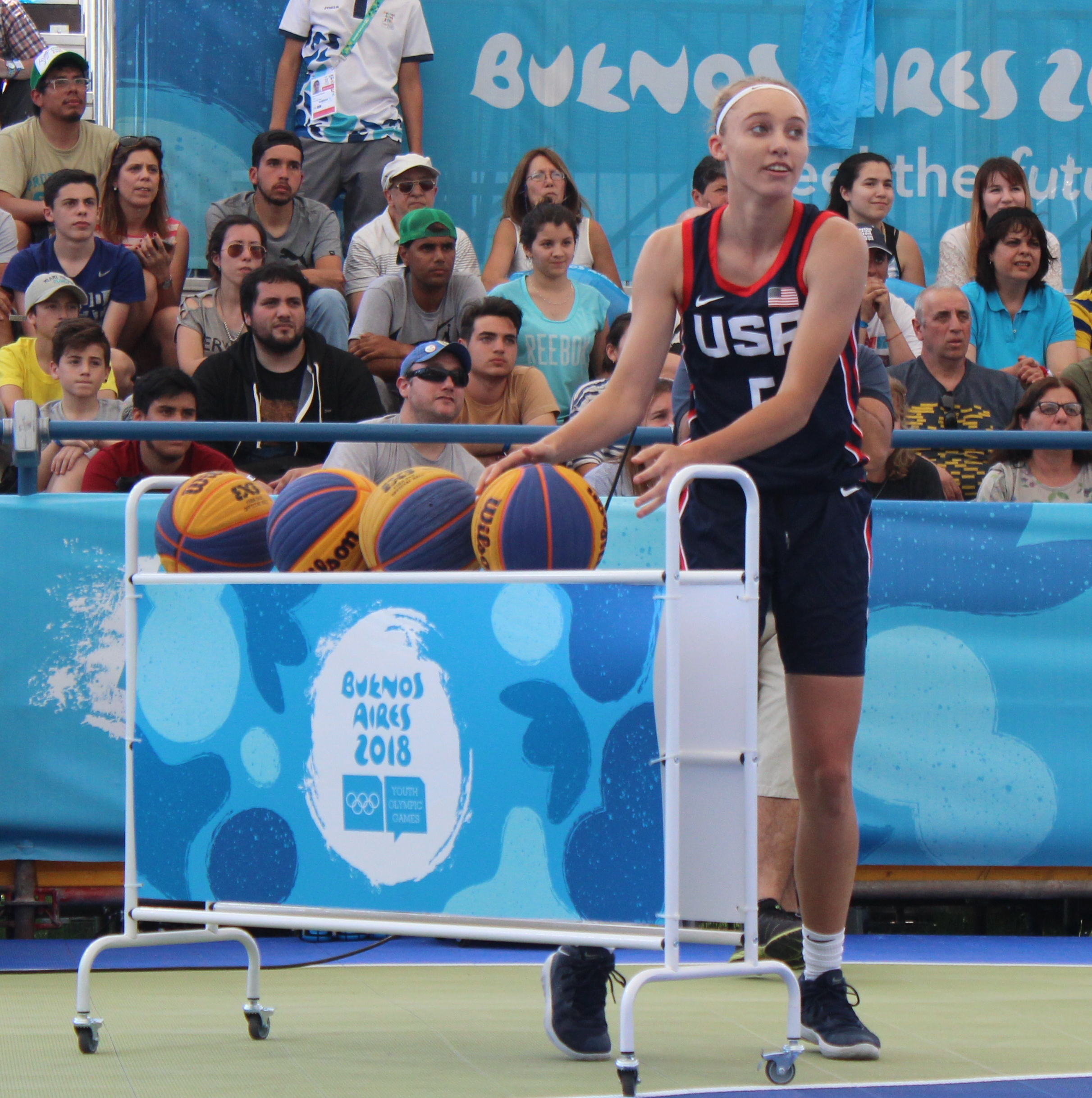 JJOO de la Juventud Buenos Aires 2018